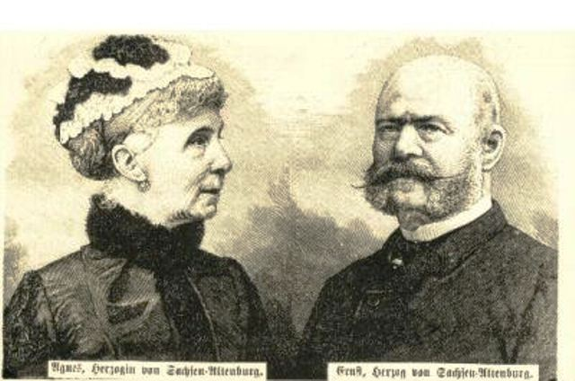 Herzog Ernst I. von Sachsen-Altenburg (1826-1908) und seine Gemahlin Agnes von Anhalt-Dessau